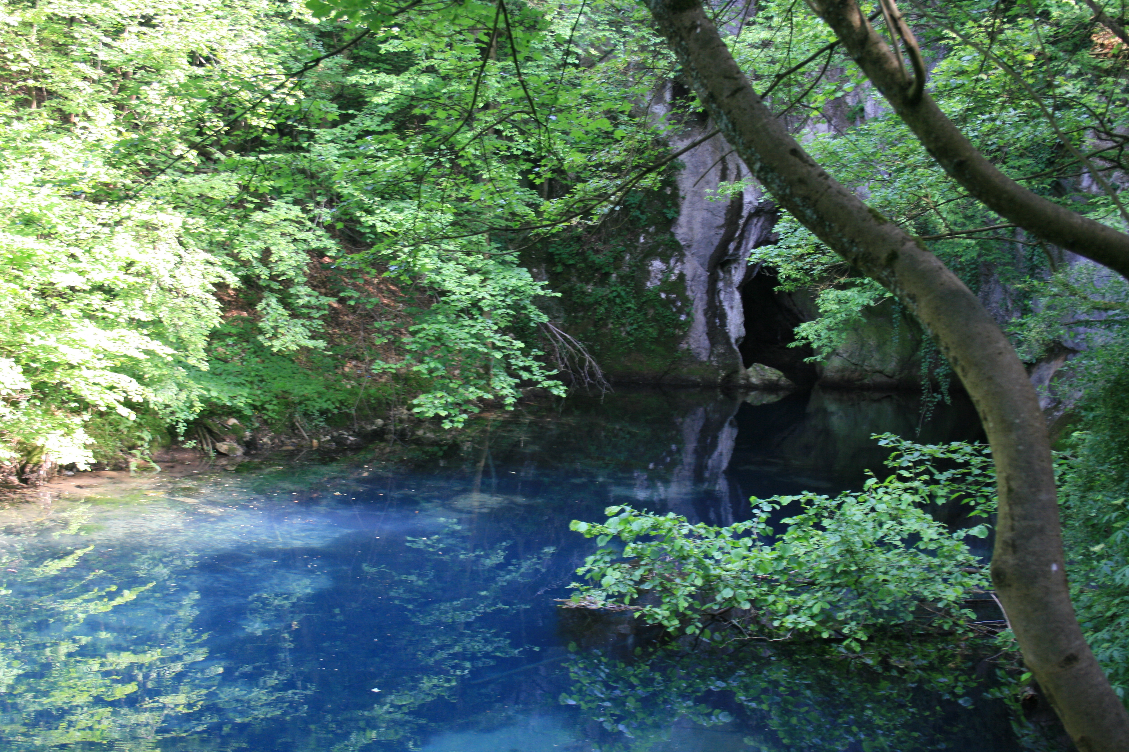 Serbia: Krupajska Reka.